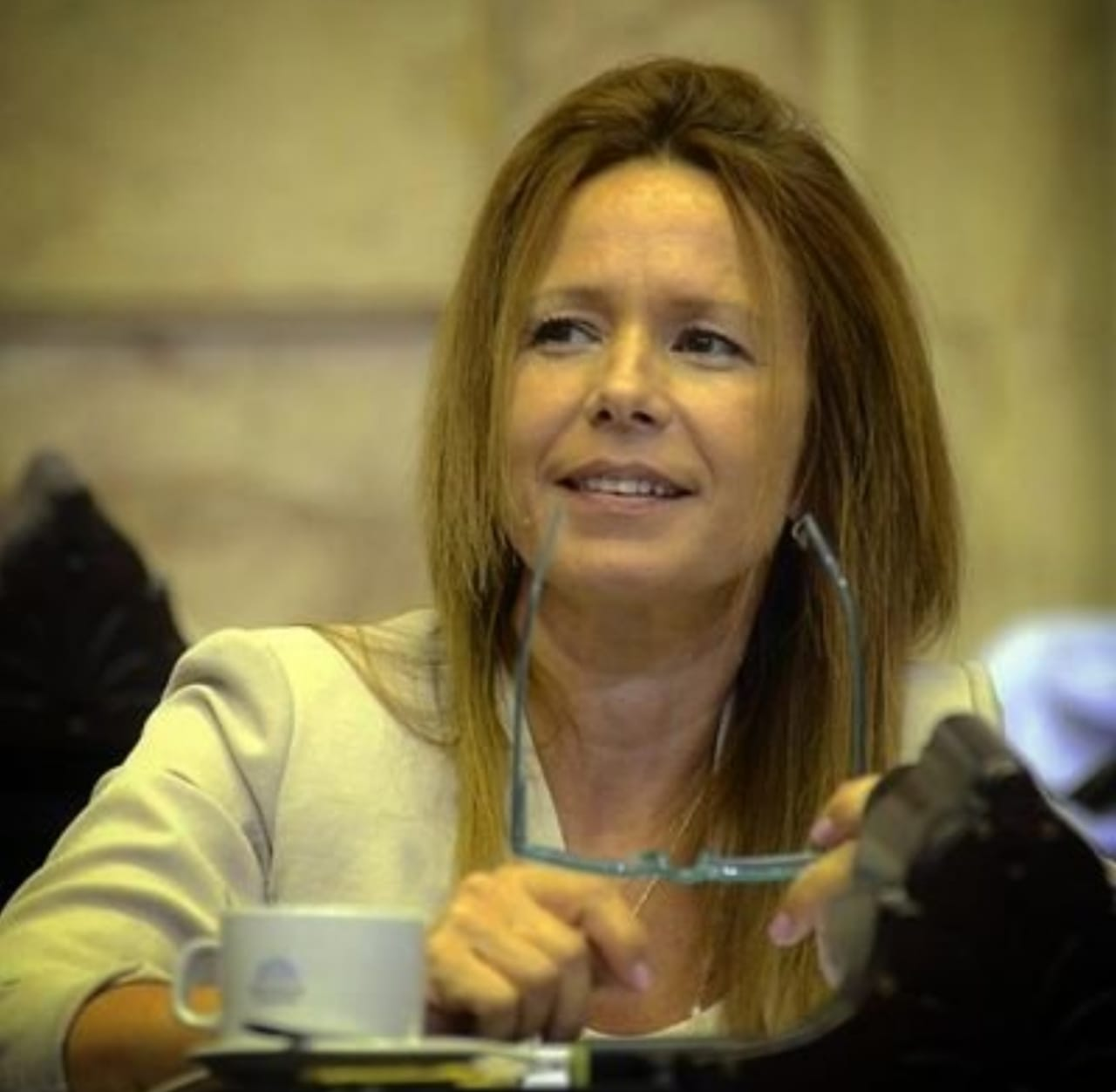 Astrid Hummel